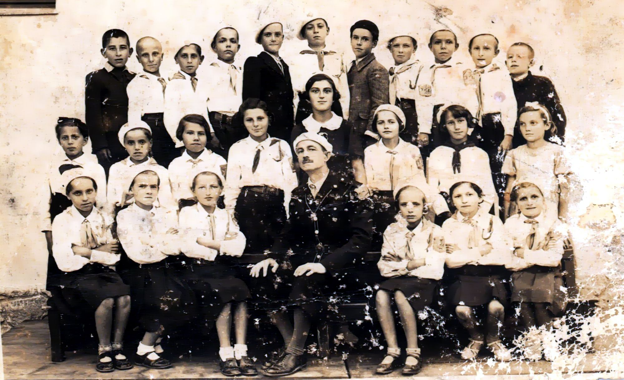 Young Romanian Străjeri (~guardians)